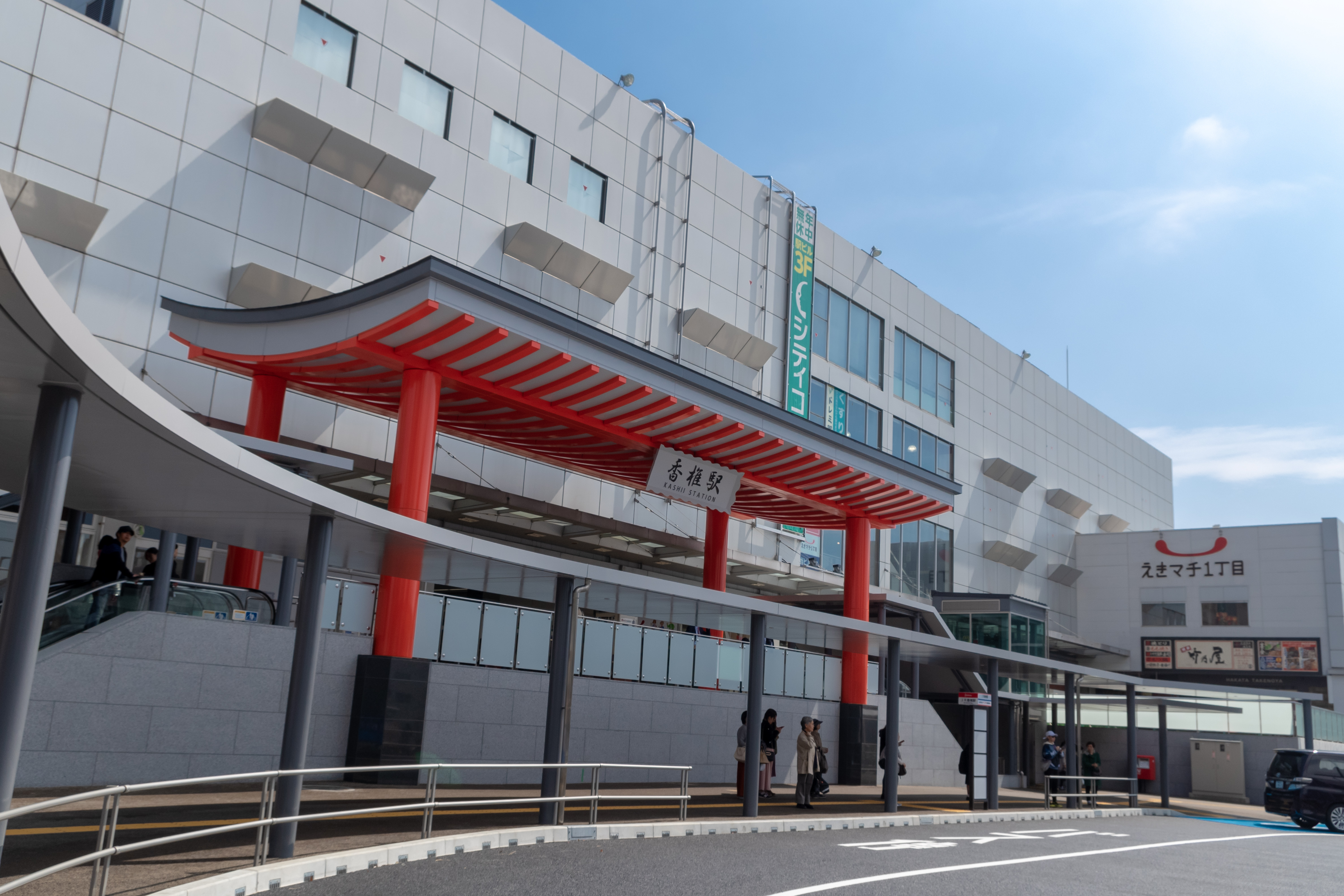 香椎駅出口